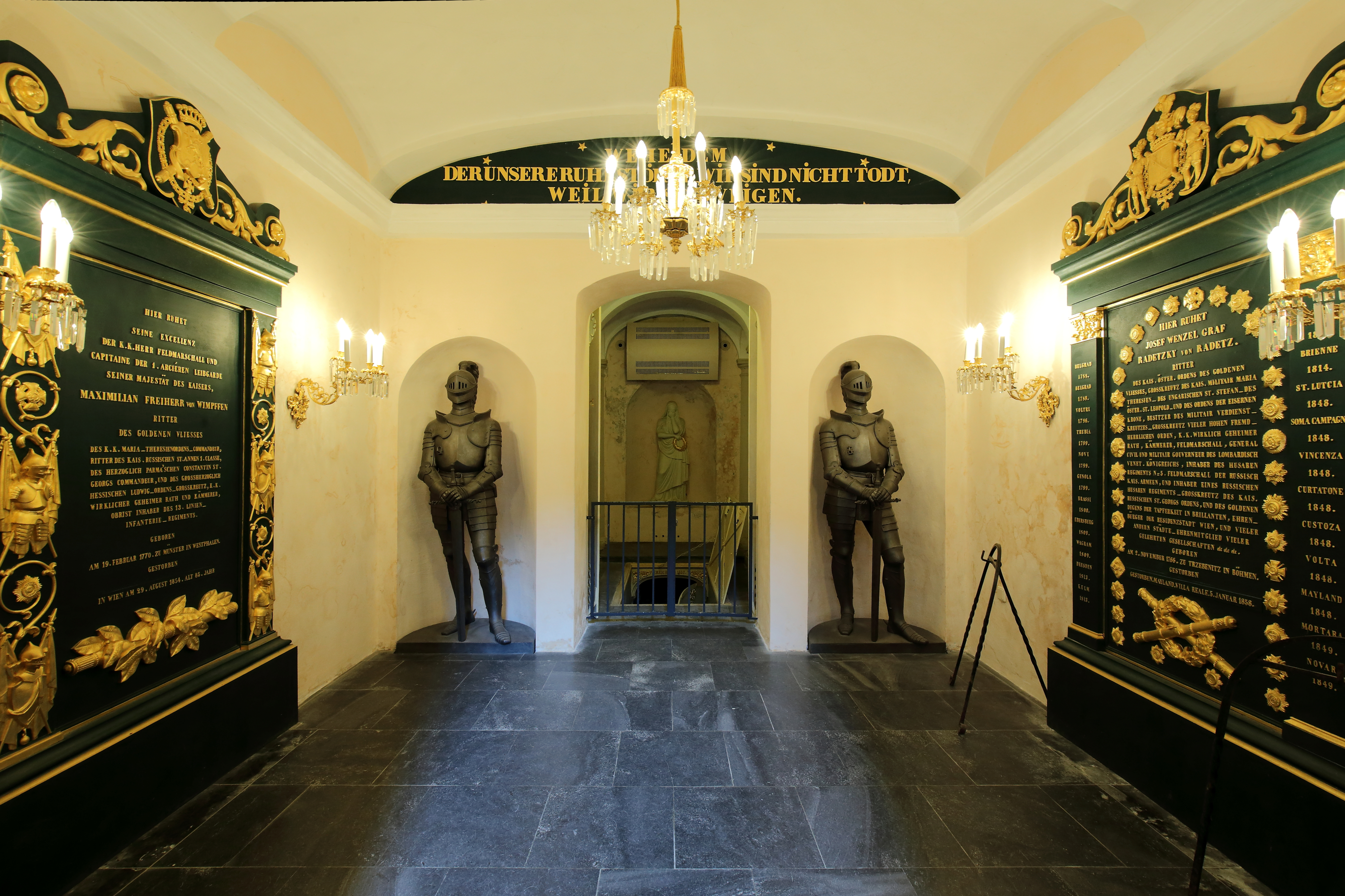 Die Gruft unter dem Obelisk am Gelände der Gedenkstätte Heldenberg in Kleinwetzdorf, ein Ortsteil der niederösterreichischen Gemeinde Heldenberg. Sie ist die Ruhestätte von Feldmarschall Josef Wenzel Radetzky von Radetz, Feldmarschall Maximilian von Wimpffen und dem Stifter Joseph Gottfried Pargfrieder.